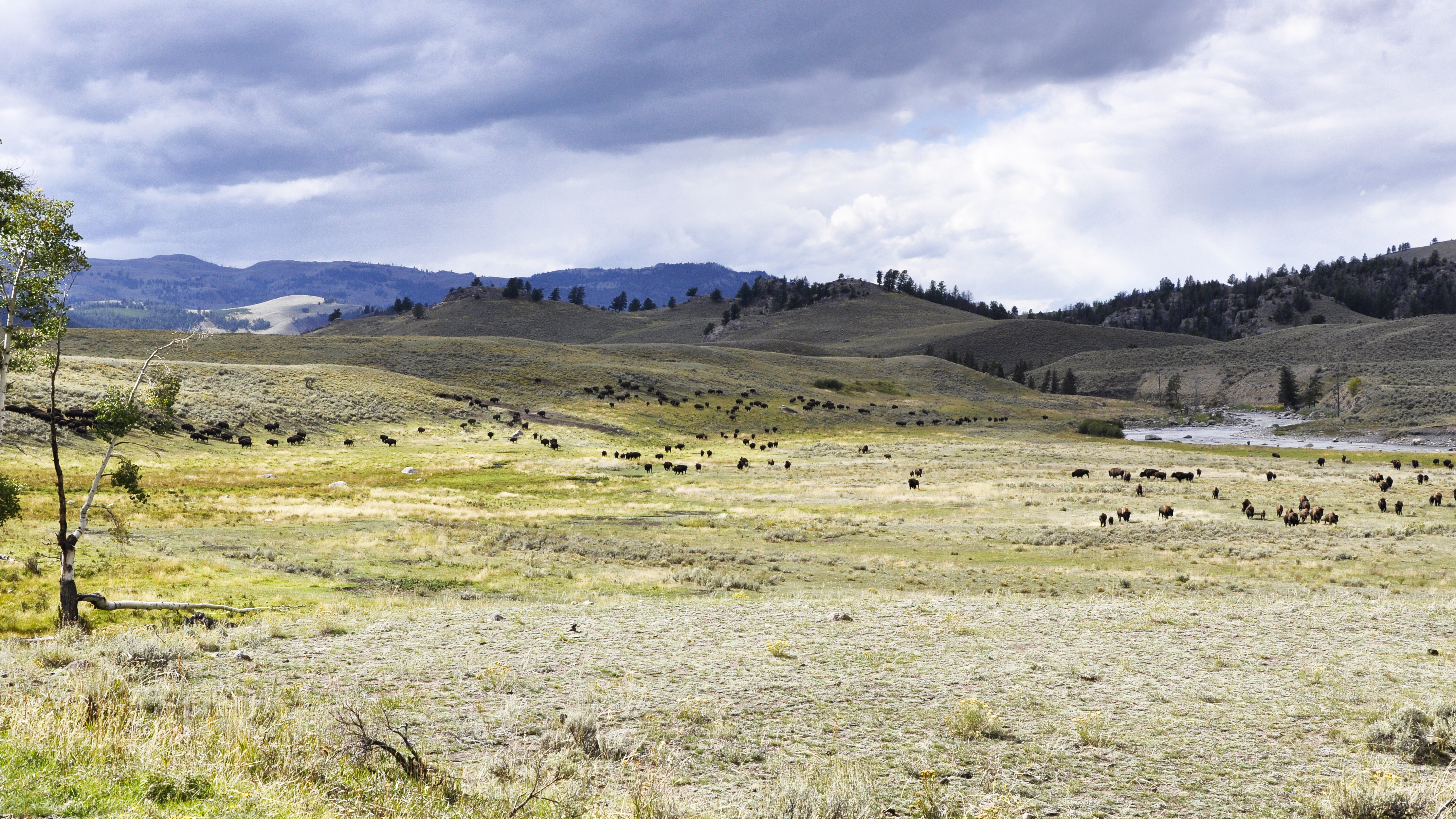 Lamar Valley en Lamr River in het Yellowstone National Park, USA